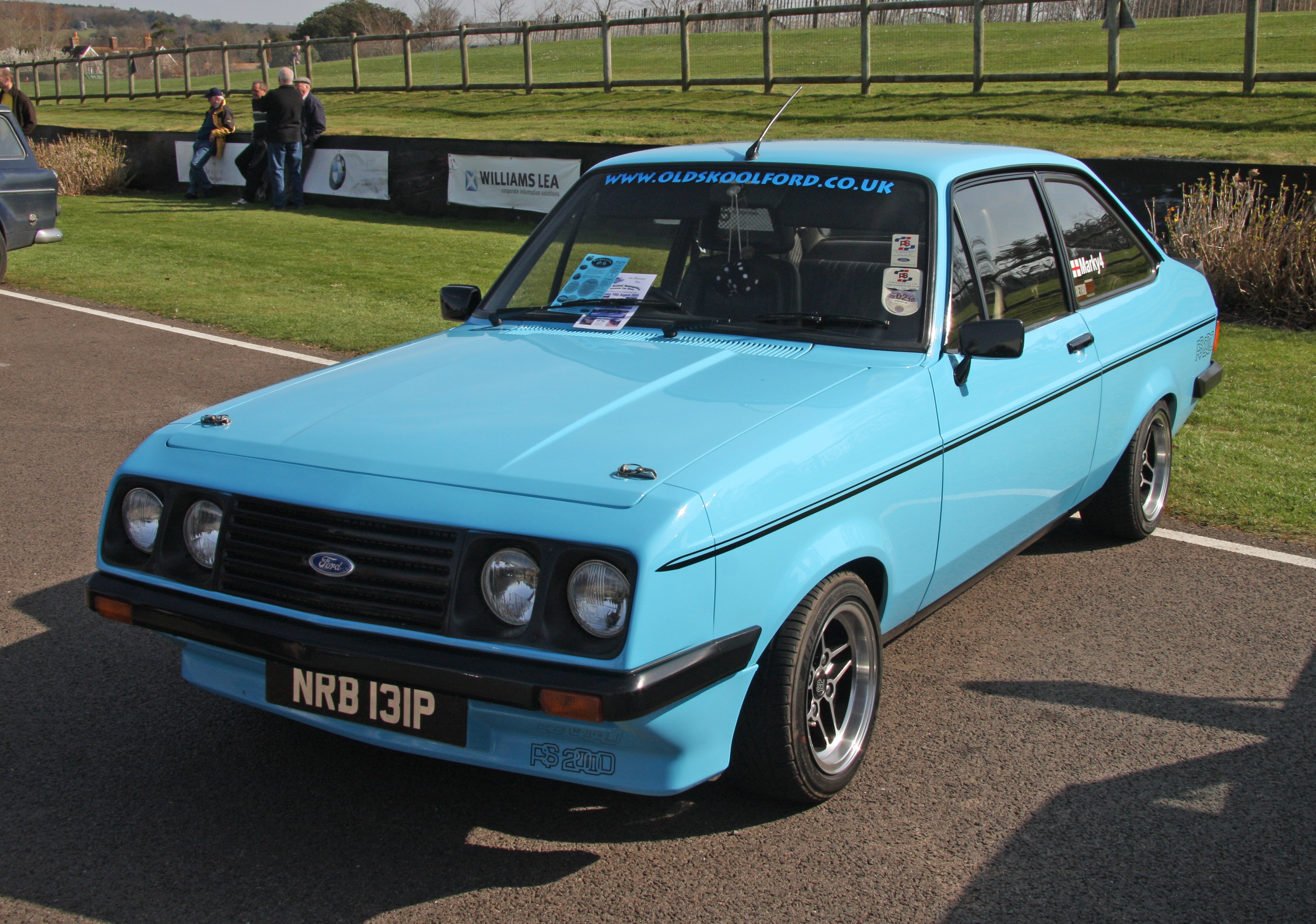 Ford Escort RS 2000